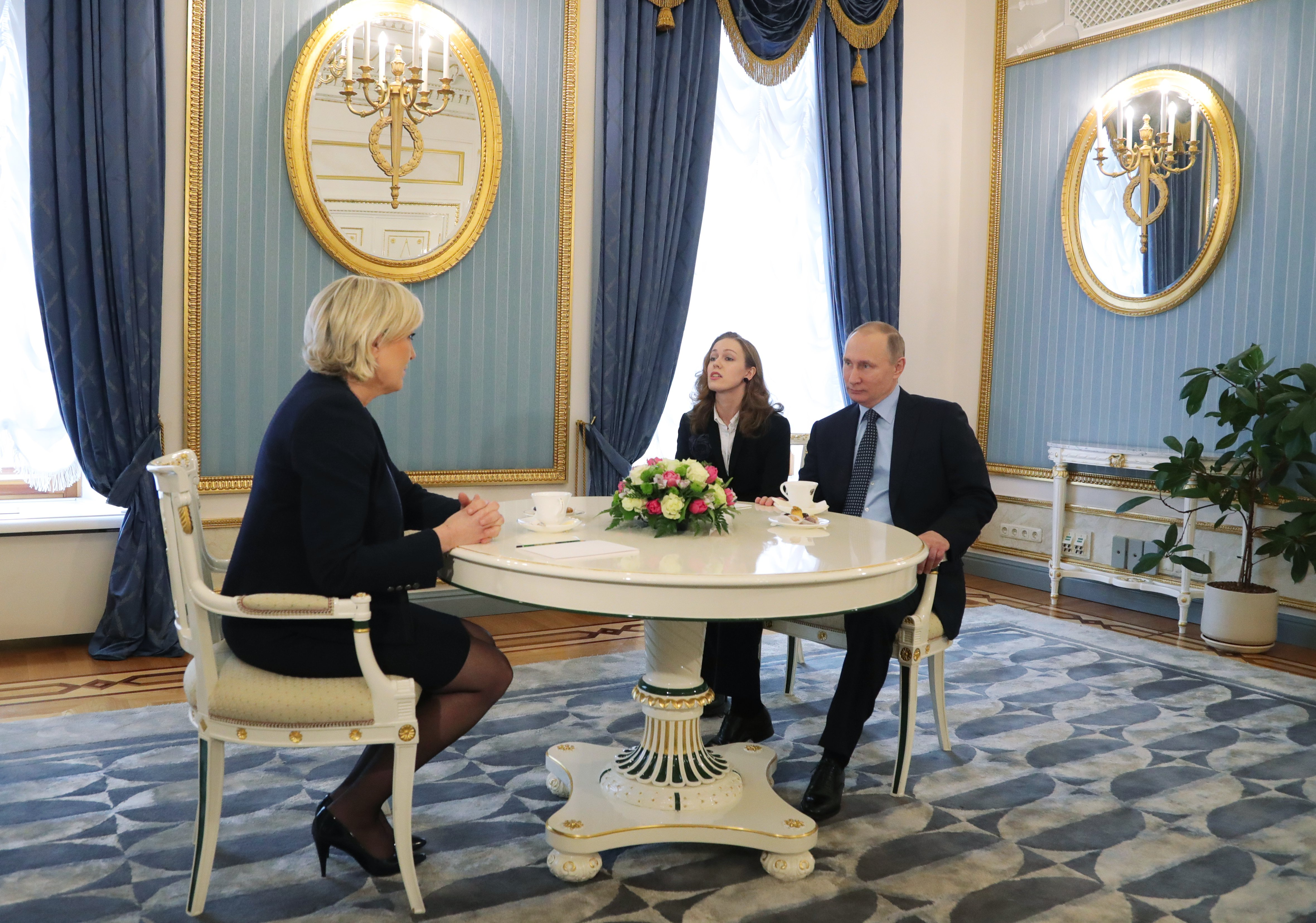 Встреча Президента России Владимира Путина с лидером политической партии Франции «Национальный фронт» Марин Ле Пен